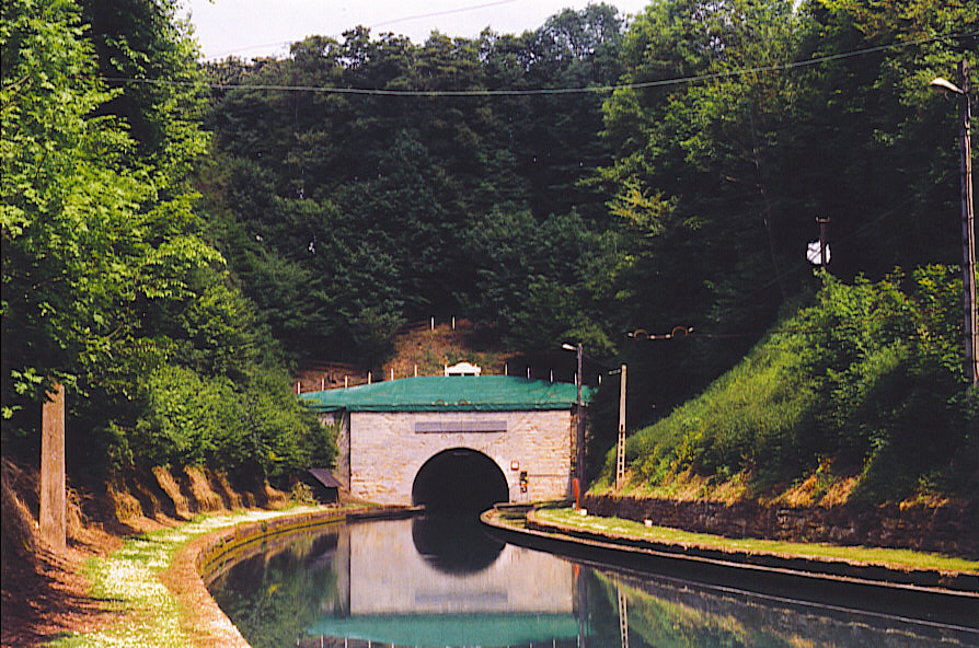 Riqueval, hameau de Bellicourt (Aisne, France) - Entrée Sud du tunnel.